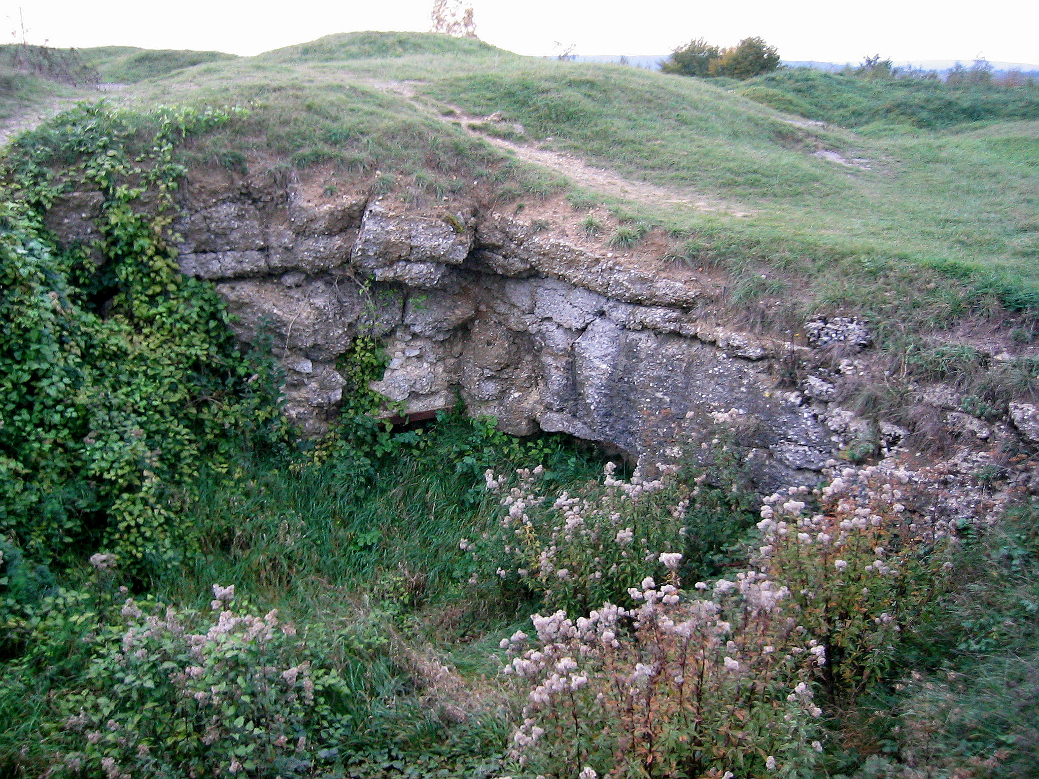 Fort de Douaumont - Partie détruite, laissant apparaître l'épaisseur de la structure